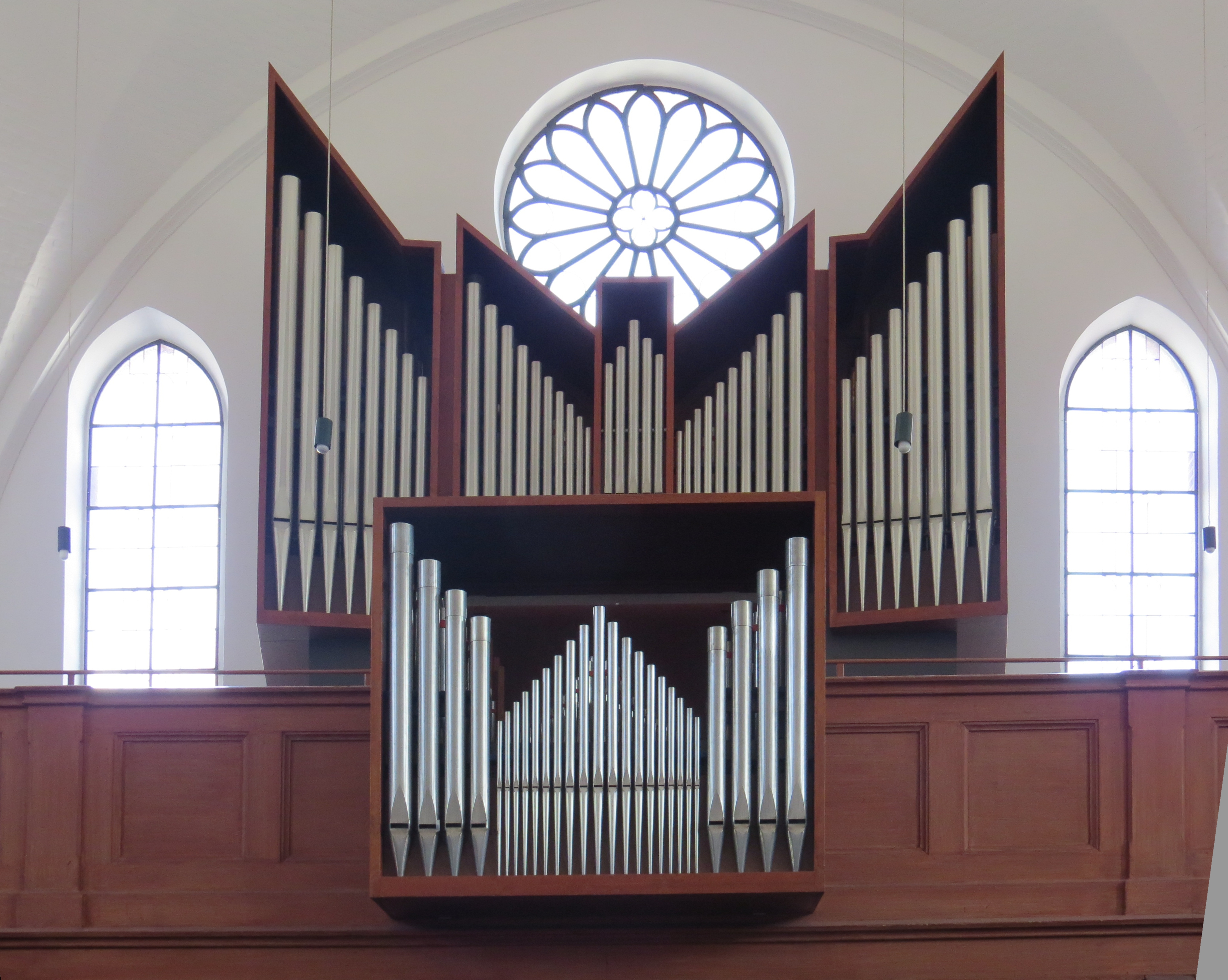 Petruskirche Neu-Ulm, Orgelprospekt vor Emporenbalustrade, Im Hintergrund Giebelrosette